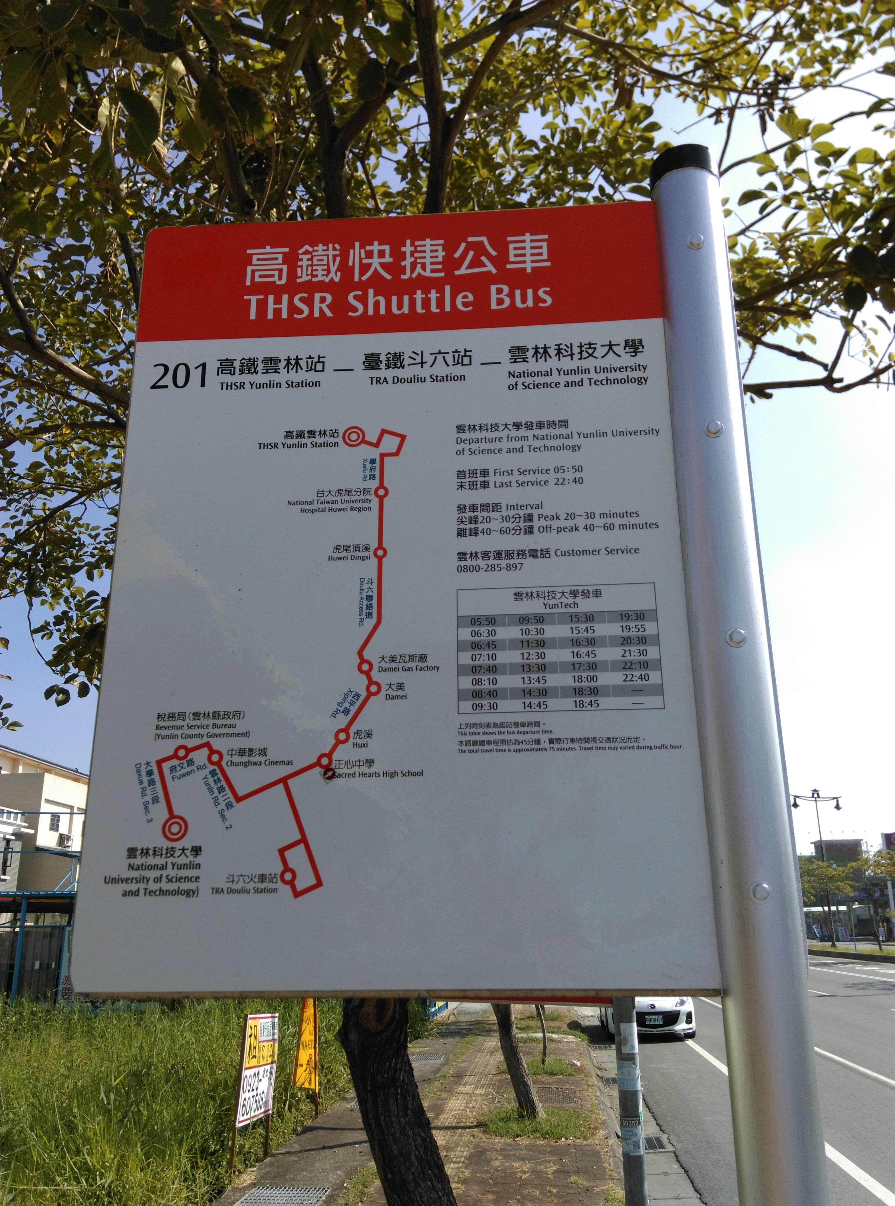 雲林客運高鐵快捷公車201路「正心中學」站牌。